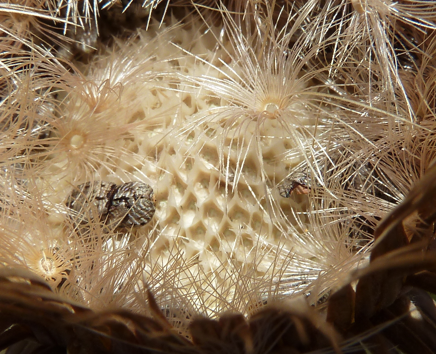 Onopordum acanthium var. acanthium - Capítulo en fructificación con cipselas in situ y receptáculo alveolado : detalle de las alvéolas poligonales con bordes escamosos. - Circa Estación de Contenedores de RENFE/ADIF de Abroñigal/Embajadores, Madrid (España).